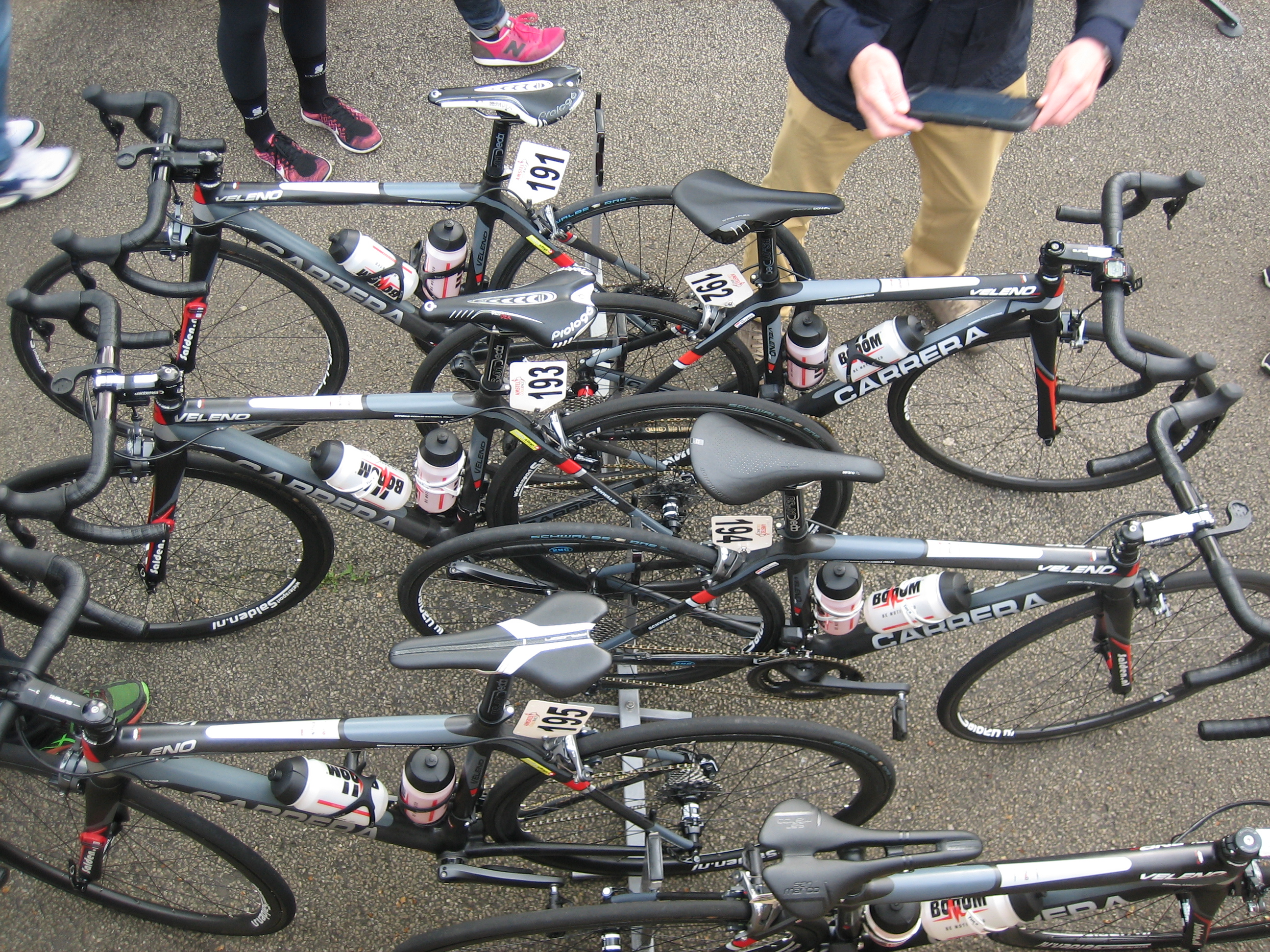 Start van de Amstel Gold Race Ladies Edition 2017 in Maastricht.